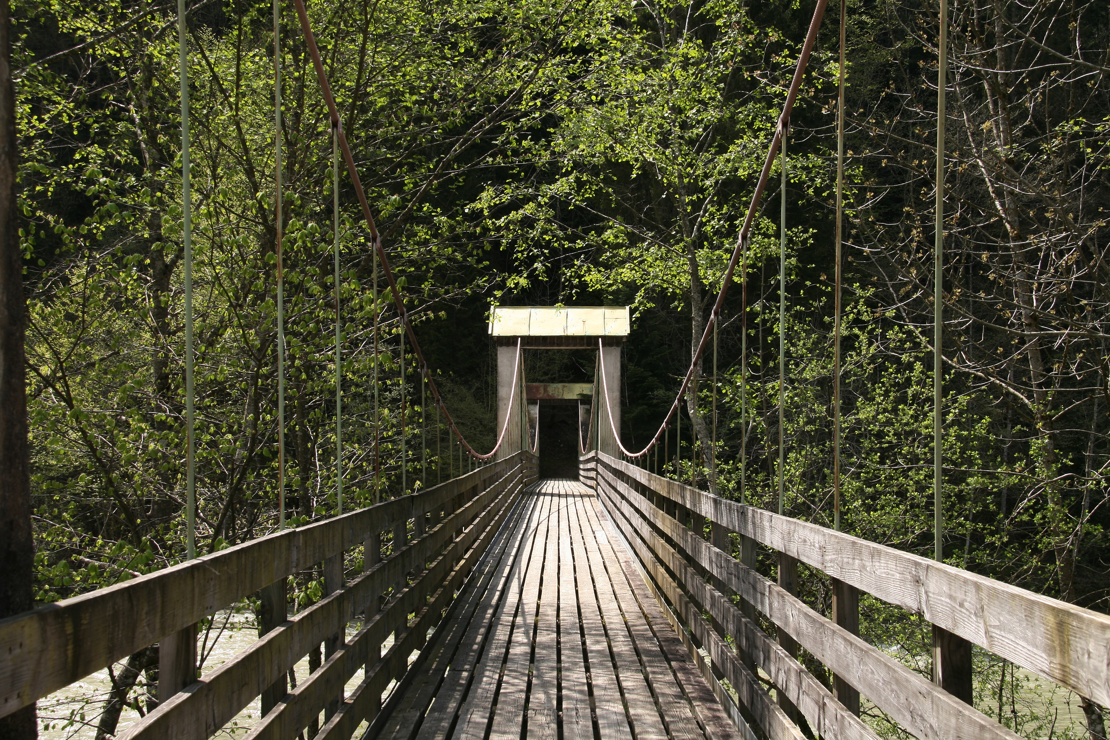 Hängebrücke in Bozenau, (Doren) über die Bregenzer Ache nach Alberschwende in Vorarlberg. Drahtseilsteg seit 1. Oktober 2003 unter Denkmalschutz gestellt.